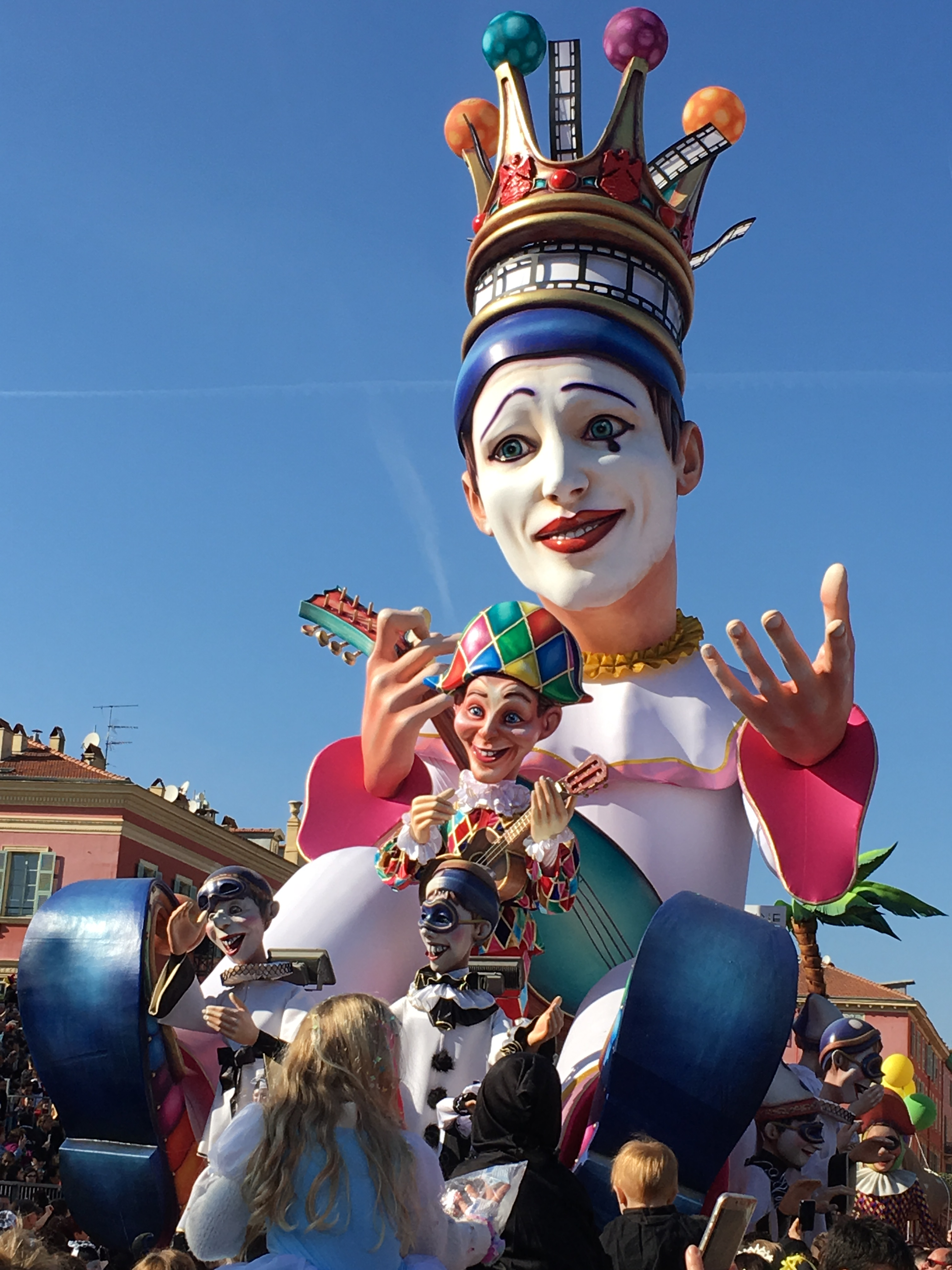 Le char du roi du carnaval de Nice, sur la place Masséna, le 24 février 2019.